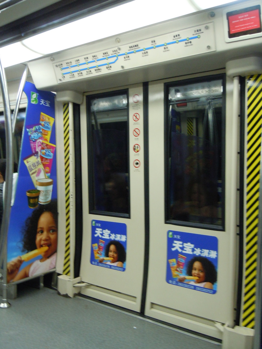 大连快轨车门